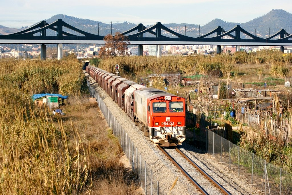 [CAT]: La primera vegada que vaig intentar fer aquesta foto, no vaig arribar a temps passant el mercant per davant dels meus nassos sense possibilitat de fer-li una foto decent. Un any mas tard, he tingut la possibilitat de treure'm l'espina que tenia clavada. A la foto la 254.02 amb un potaser procedent de la mina de Súria, ja en el ramal que el portarà al port de Barcelona. Una salutació a Javier pel matí ferroviari que vam gaudir. [ES]: La primera vez que intenté realizar esta foto, no llegué a tiempo pasando el mercante por delante de mis narices sin posibilidad de hacerle una foto decente. Un año mas tarde, he tenido la posibilidad de quitarme la espinita que tenía clavada. En la foto la 254.02 con un potasero procedente de la mina de Súria, ya en el ramal que le llevará al puerto de Barcelona. Un saludo a Javier por la mañana ferroviaria que pasamos.